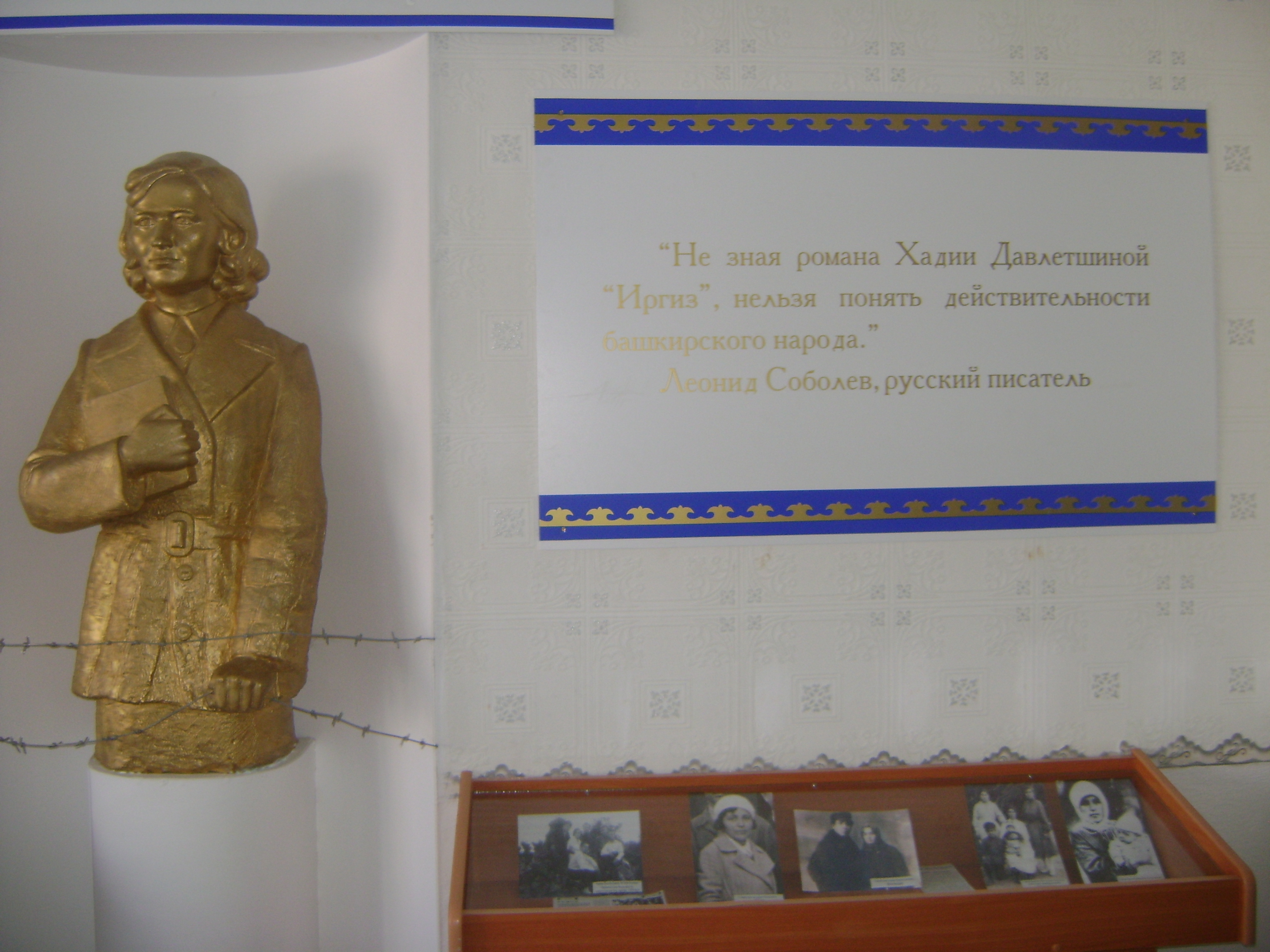 Дәүләтшина Һәҙиә Лотфулла ҡыҙы